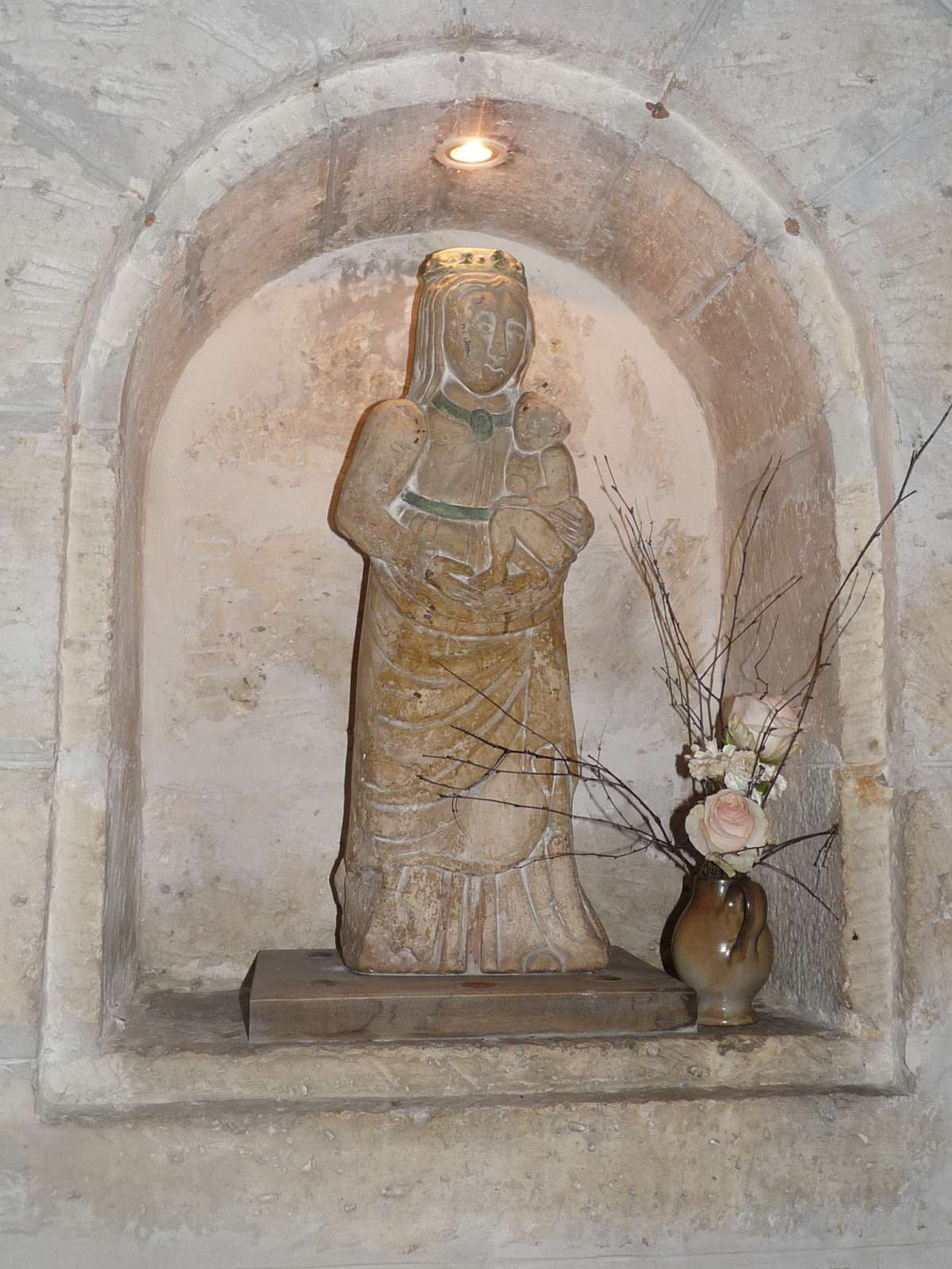 statue de la Vierge dans l'église L'Isle-d'Espagnac, Charente, France